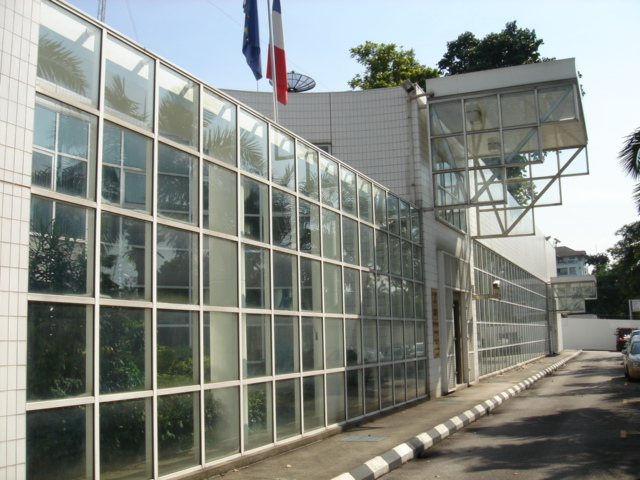 Ambassade de France en Malaisie